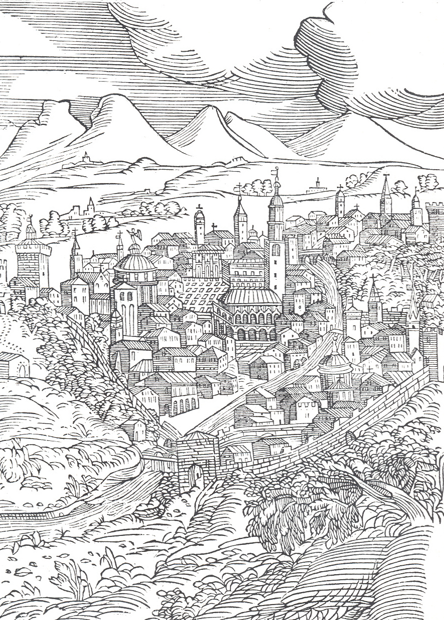 Incisione del 1604 della città di Vicenza prodotta da un autore anonimo.